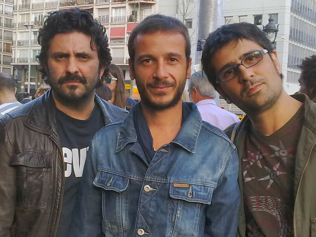 Especialistas Secundarios durante la firma de su libro "Podría ser peor" en Barcelona